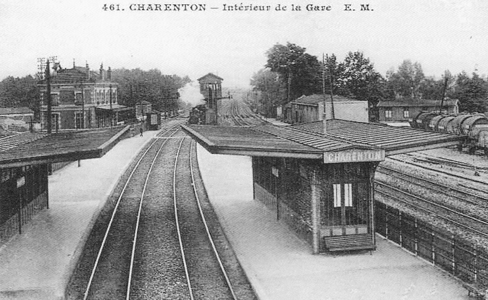 Ancienne gare de Charenton (Val-de-Marne - France), au début du XX° siècle.